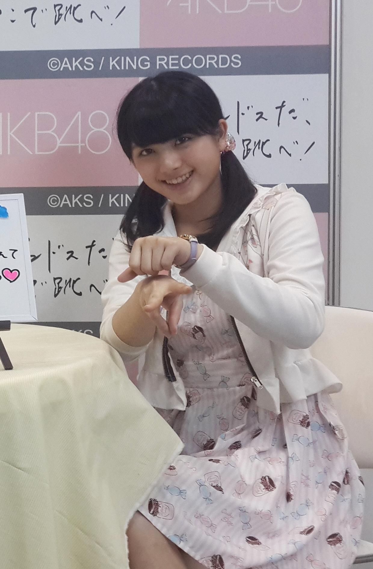 150505 『여기가 로도스다 여기서뛰어라!』샤메회 후기 (Nana Owada)